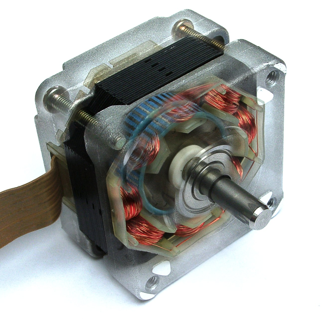 Schrittmotor mit Permanentmagnet.